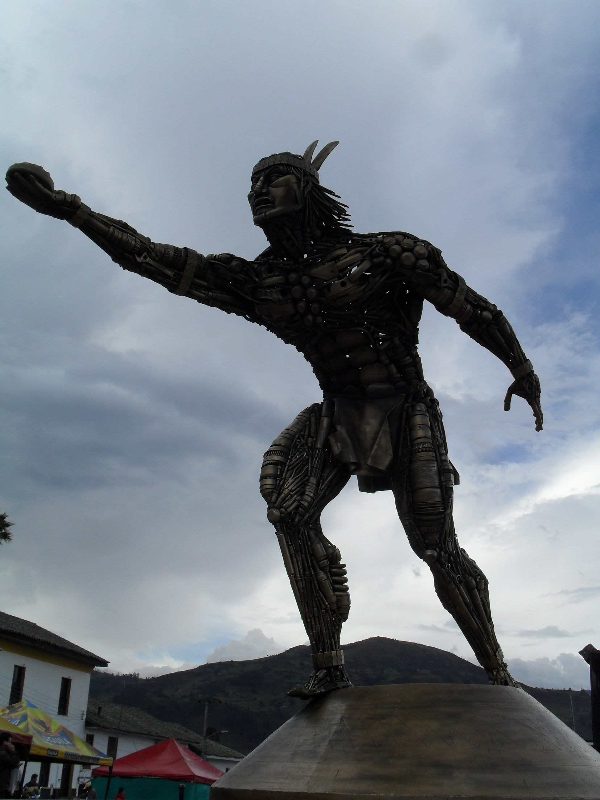 Estatua de indígena practicando el deporte del turmequé en el municipio de Turmequé, Boyacá, Colombia